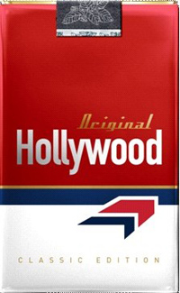 Embalagem promocional Clássica do Cigarro Hollywood